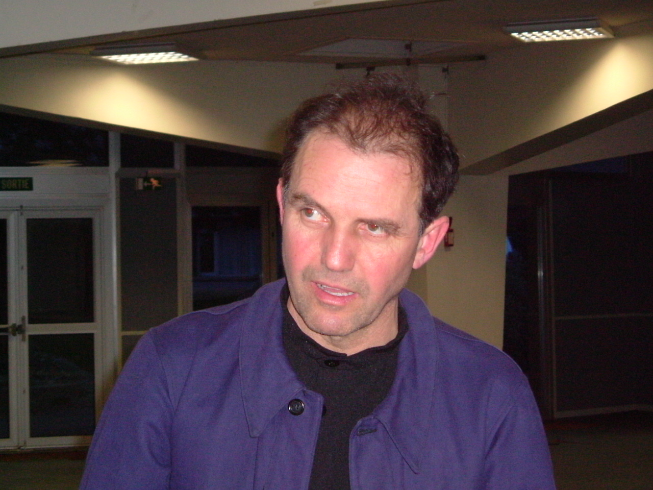 Goulc'han Kervella, saver pezhioù-c'hoari ha rener Strollad ar Vro-Bagan